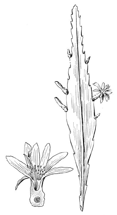 Pseudorhipsalis alata (Hylocereeae; Cactaceae; Planta) Nathaniel Lord Britton és Joseph Nelson Rose "The Cactaceae" c. könyvéből